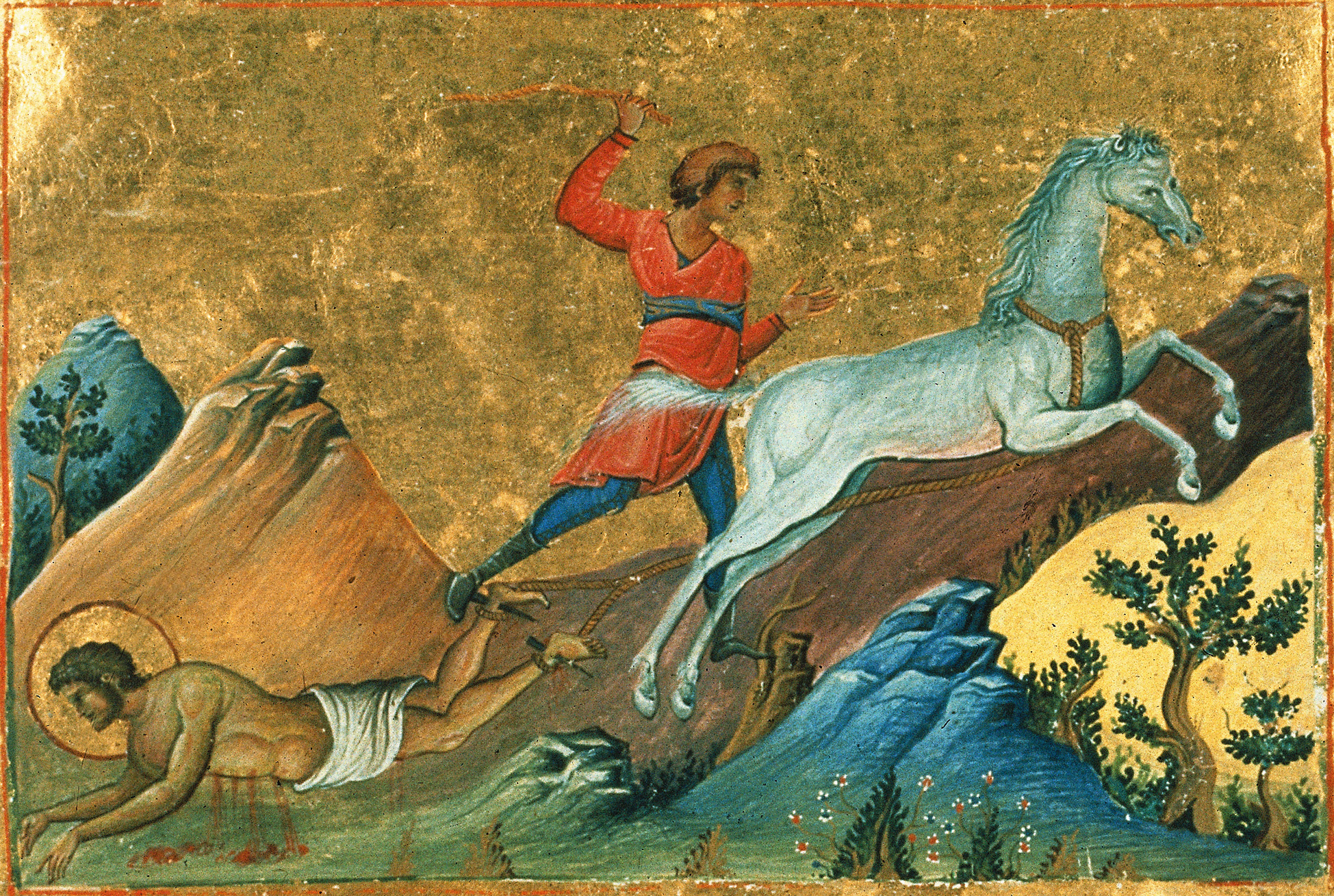 Орест Тианский (Каппадокийский), мч. Константинополь. 985 г. Миниатюра Минология Василия II. Ватиканская библиотека. Рим.